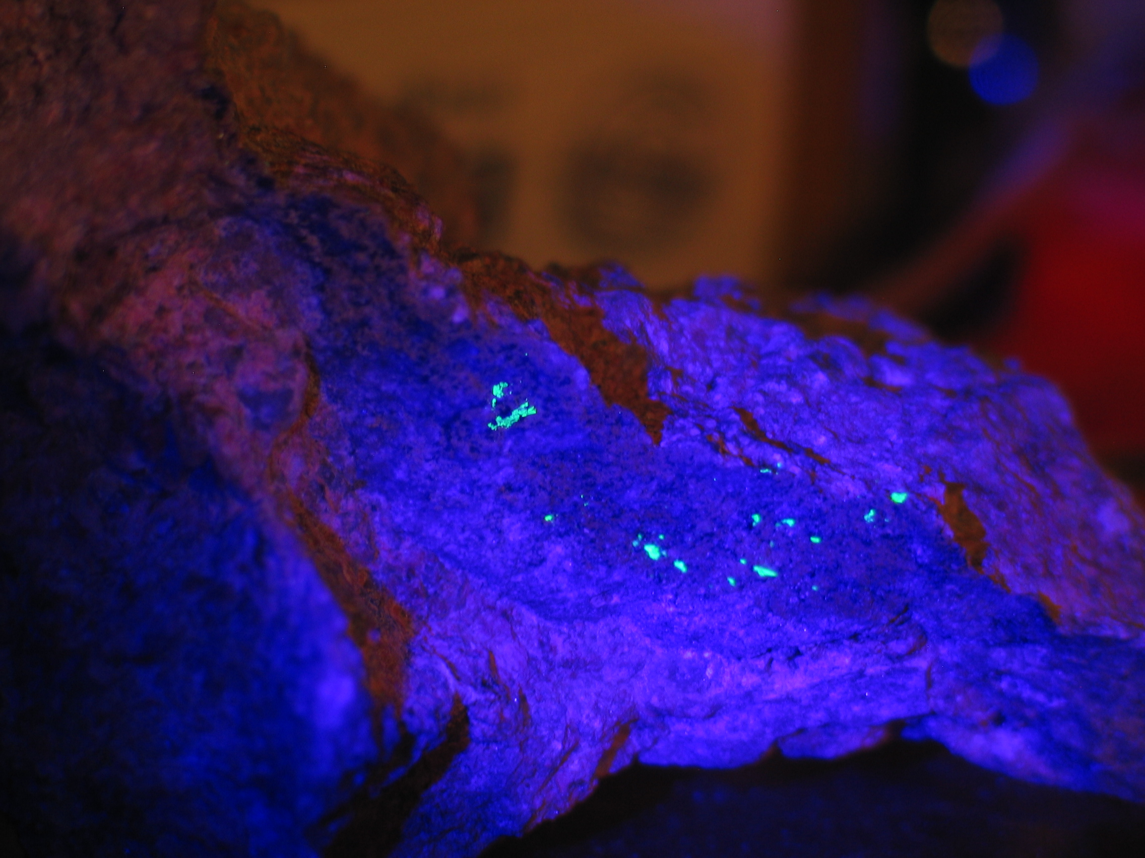 Unter UV-Licht fluoreszierendes Uranocircit – die kleinen hellen Flecken – aus dem Wölsendorfer Revier bei Nabburg (Oberpfalz).